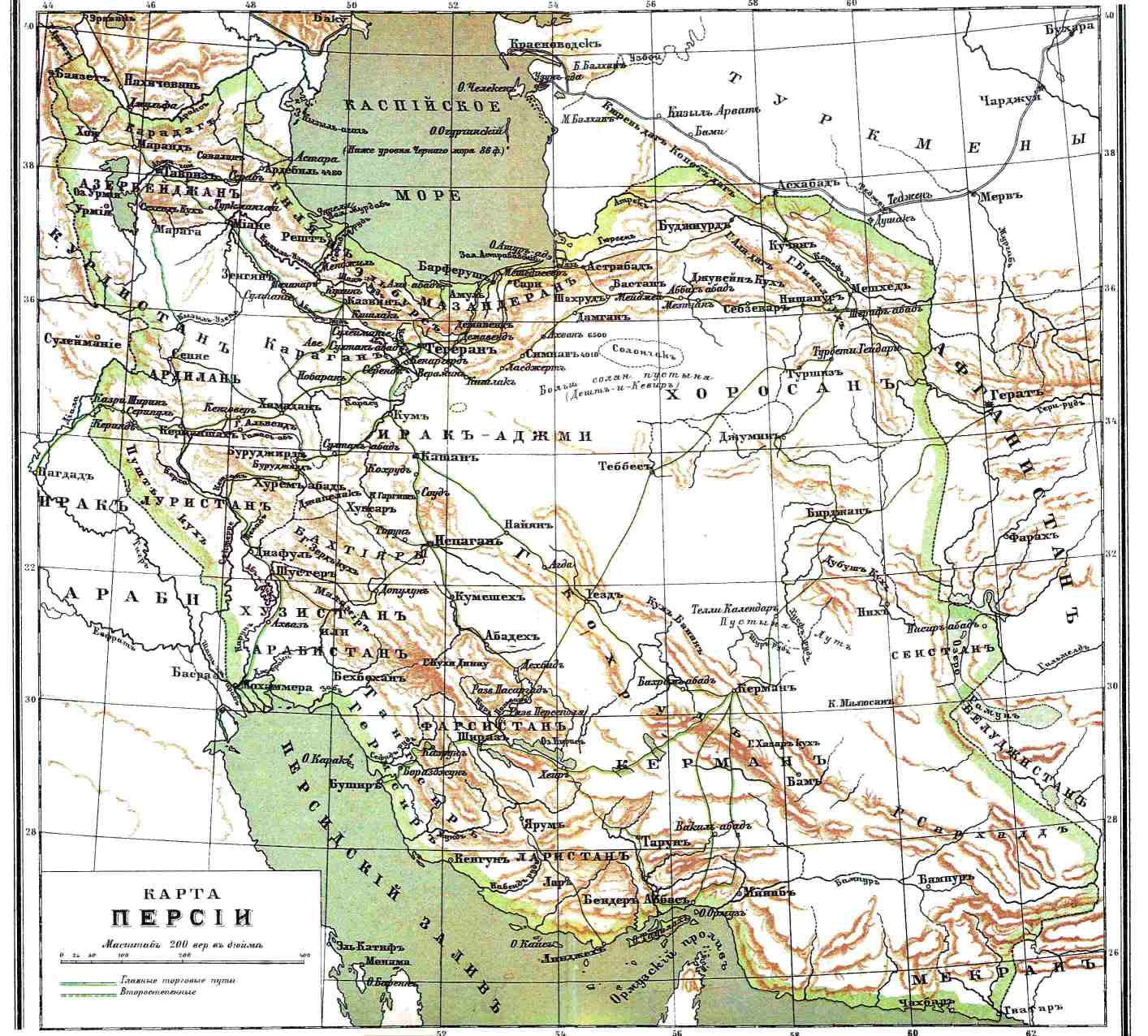 Карта Персии в начале XX века. Иллюстрация из энциклопедии Брокгауза и Ефрона